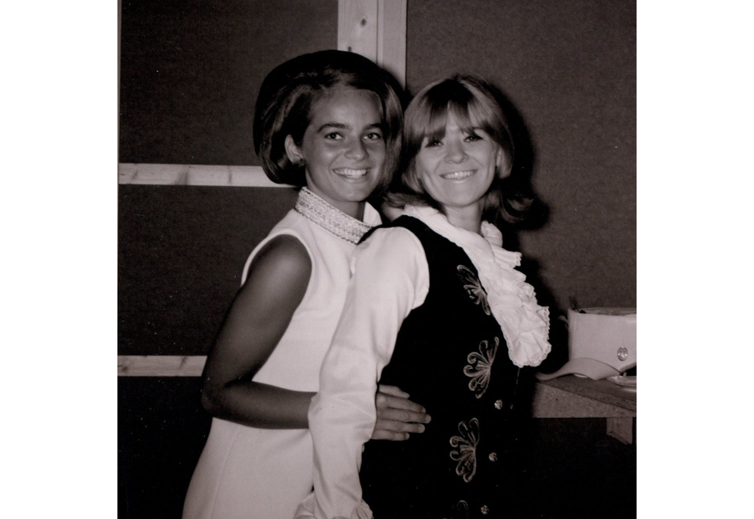 Popsangerne Vigdis Mostad (t.v.) og Kirsti Sparboe fotografert under Orkladagene 1968